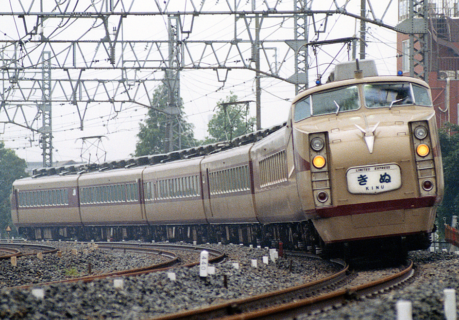 東武鉄道 DRC きぬ